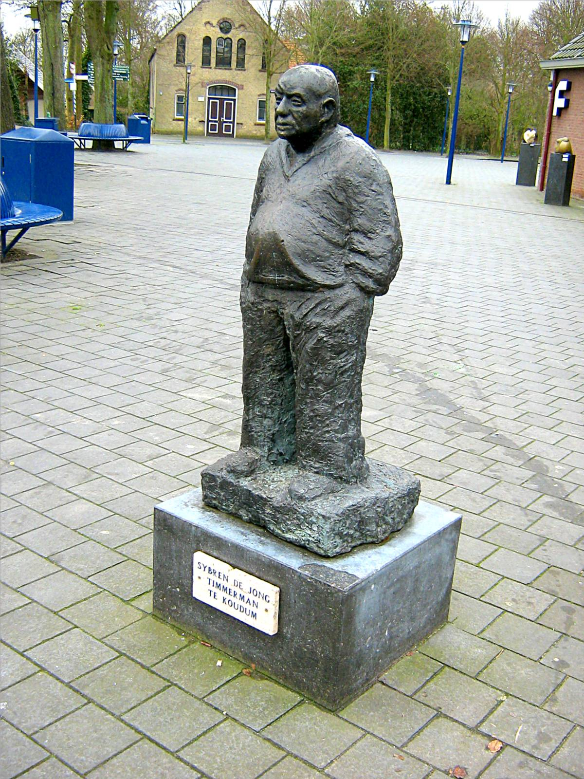 Herma Bovenkerk,1990